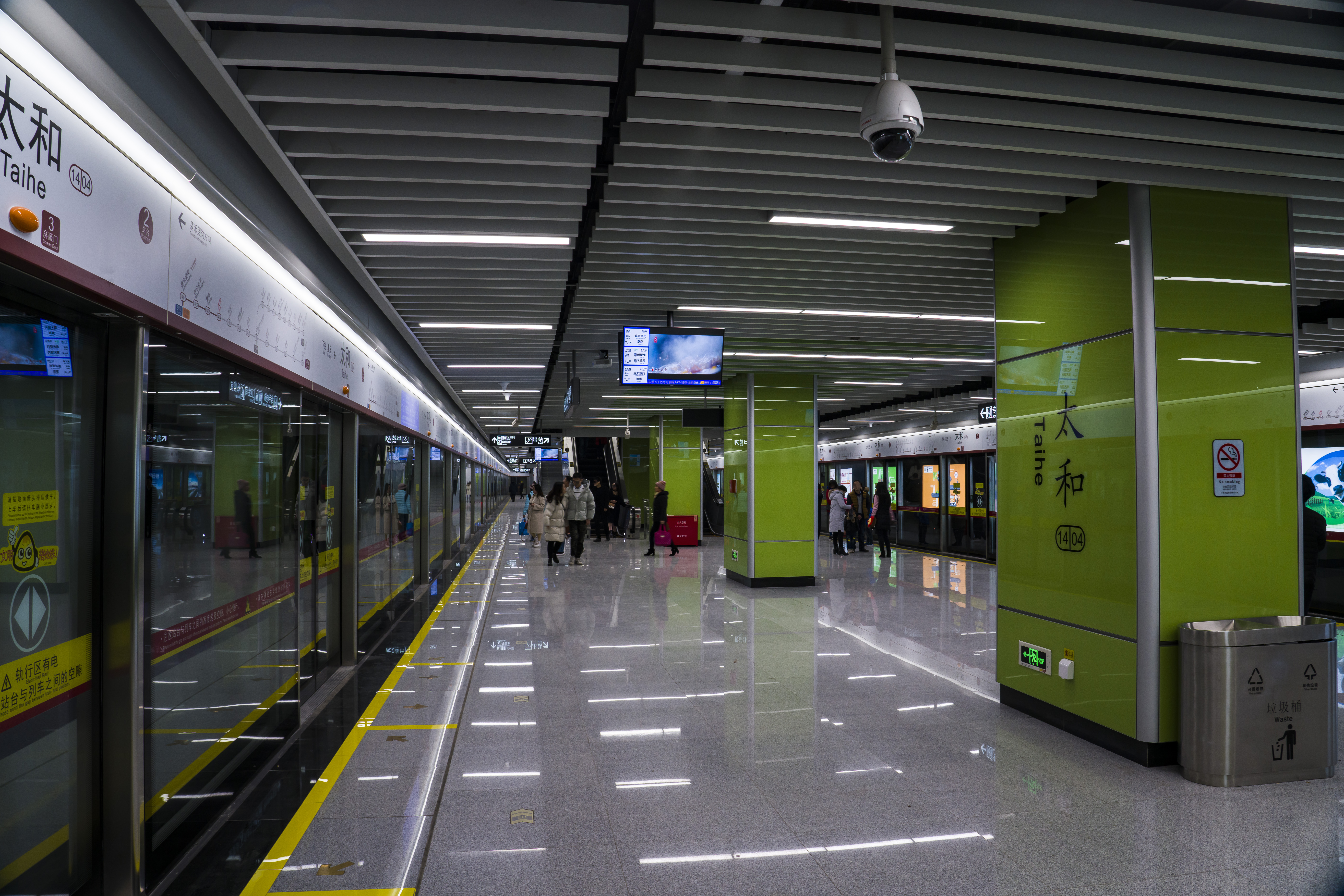 太和站站台